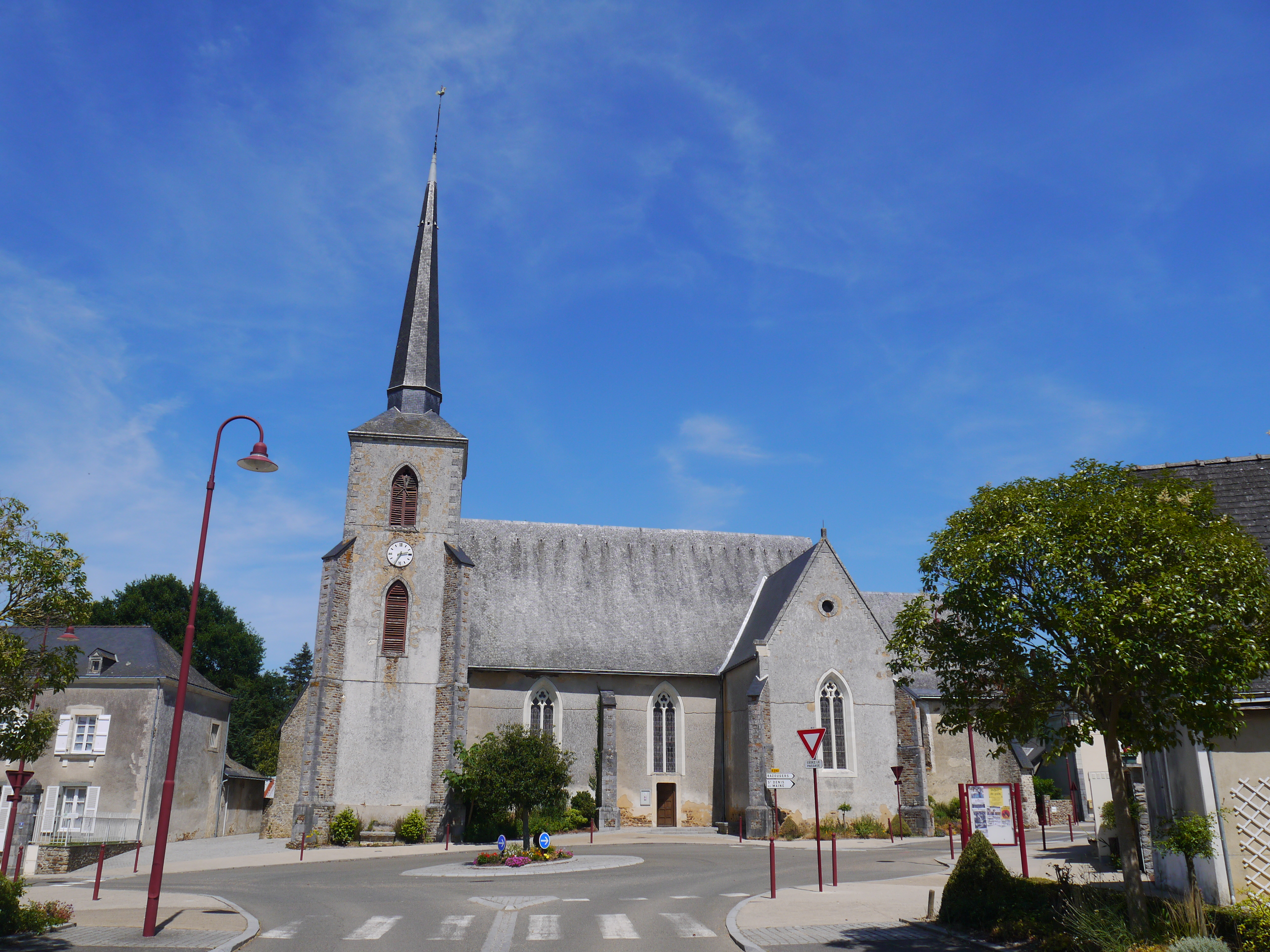 L'église Saint-Germain.